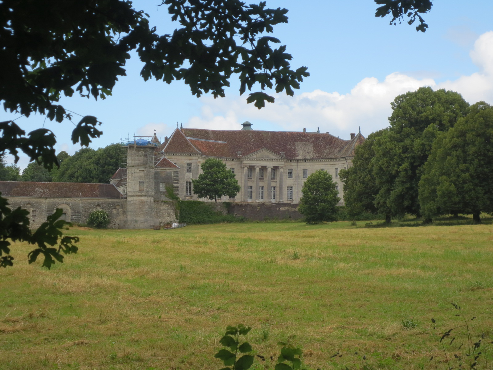 Château de Moncley